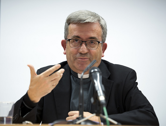 Conferencia en Valladolid.